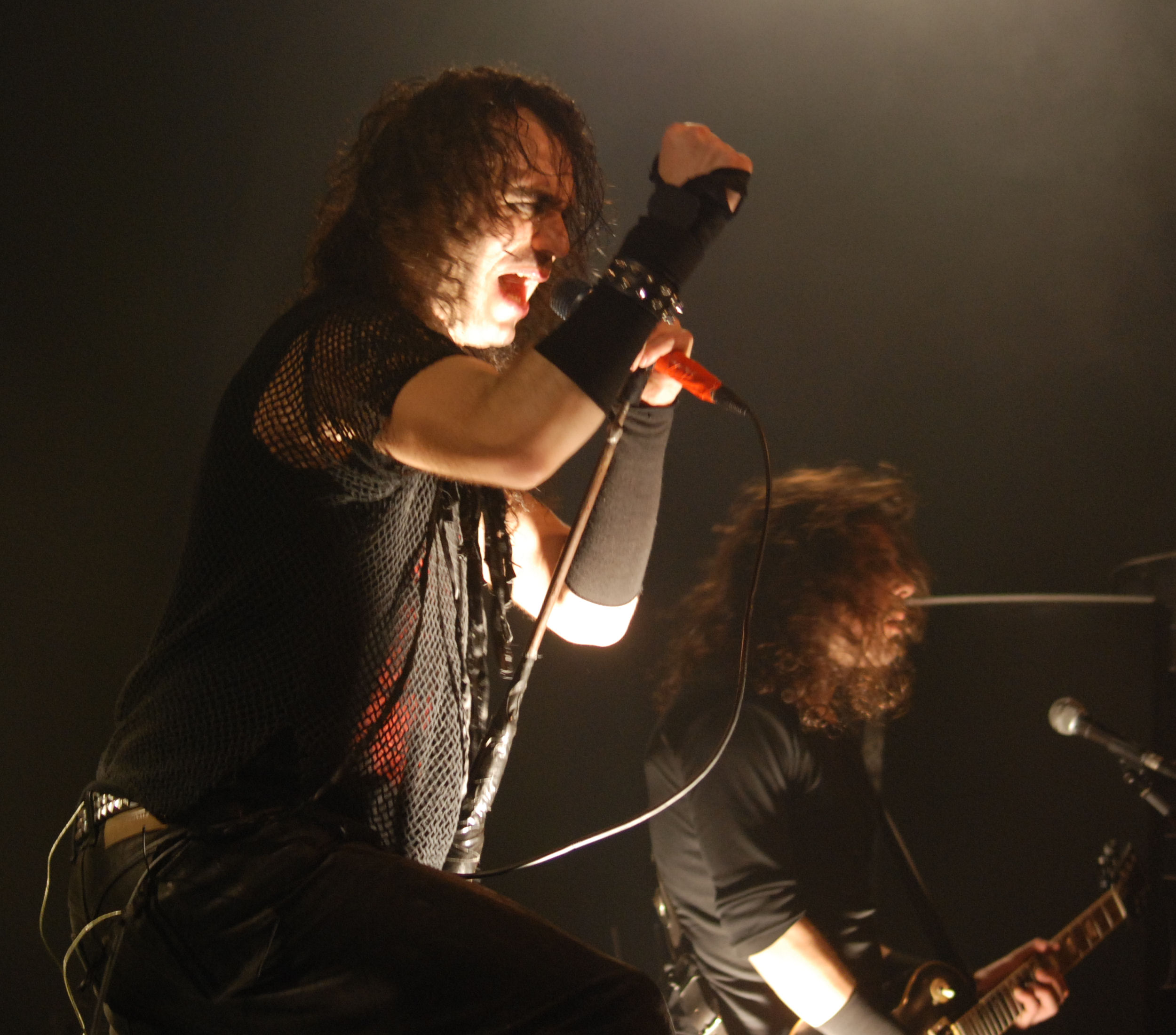 Koncert Moonspell'a (Fernando Ribeiro) w klubie Studio w Krakowie